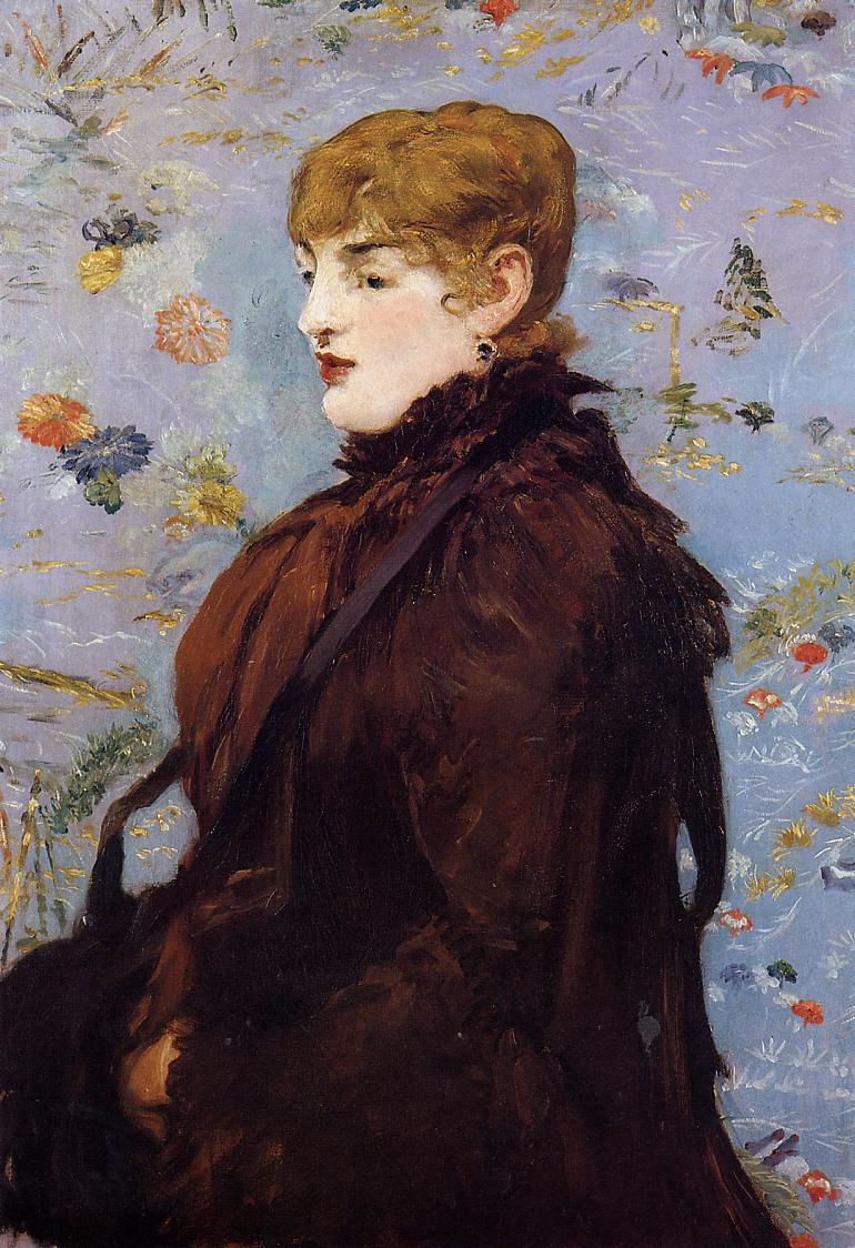 Tableau ni signé, ni daté (les experts le font remonter à 1882 et le placent dans un ensemble de quatre panneaux sur le thème des quatre saisons, seul le Printemps subsistant), il représente le modèle de Manet, Méry Laurent. Se détachant sur un fond bleu brodé de chrysanthèmes, elle porte une fourrure du couturier Charles Frederick Worth. Mise aux enchères en 1883, la toile est acquise par 1550 francs par Méry Laurent qui la lègue au musée de Nancy.